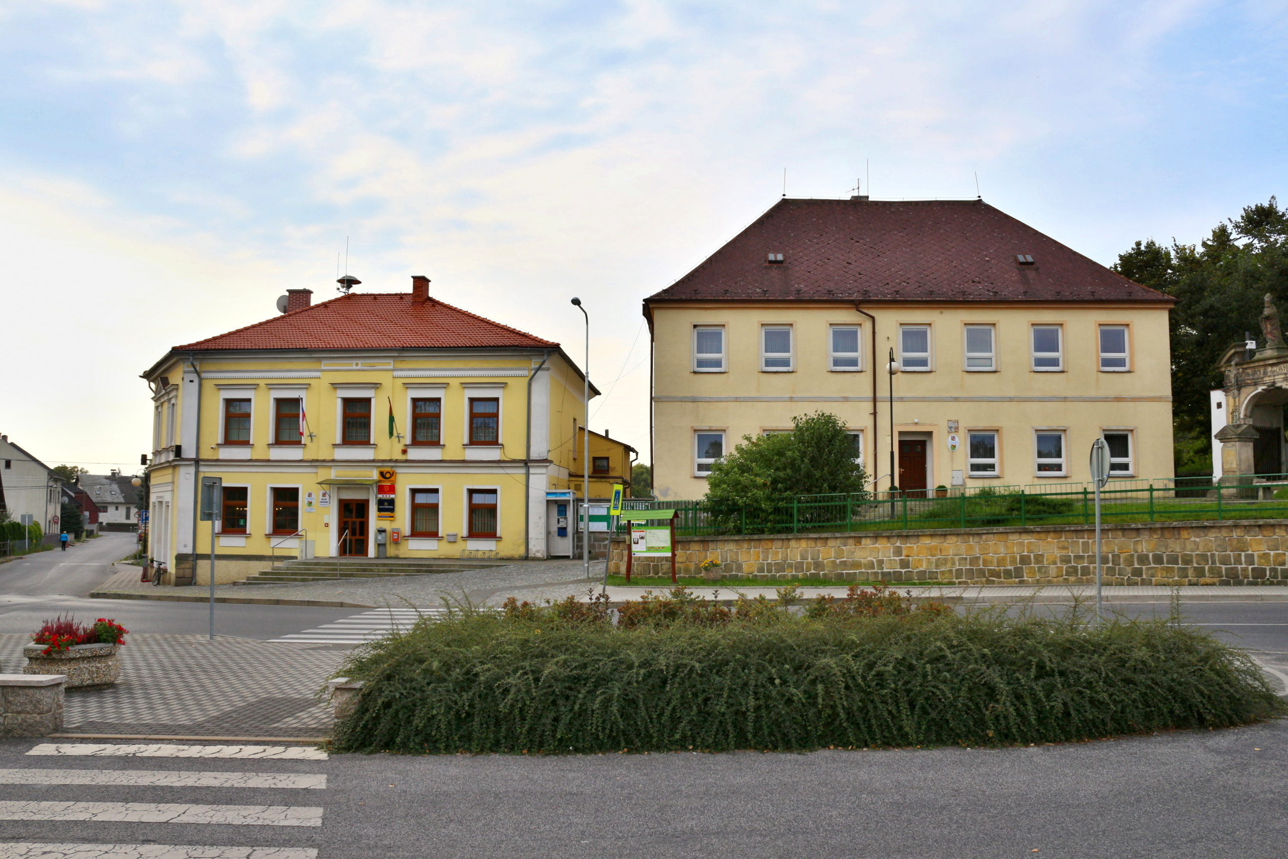 Brniště náměstí